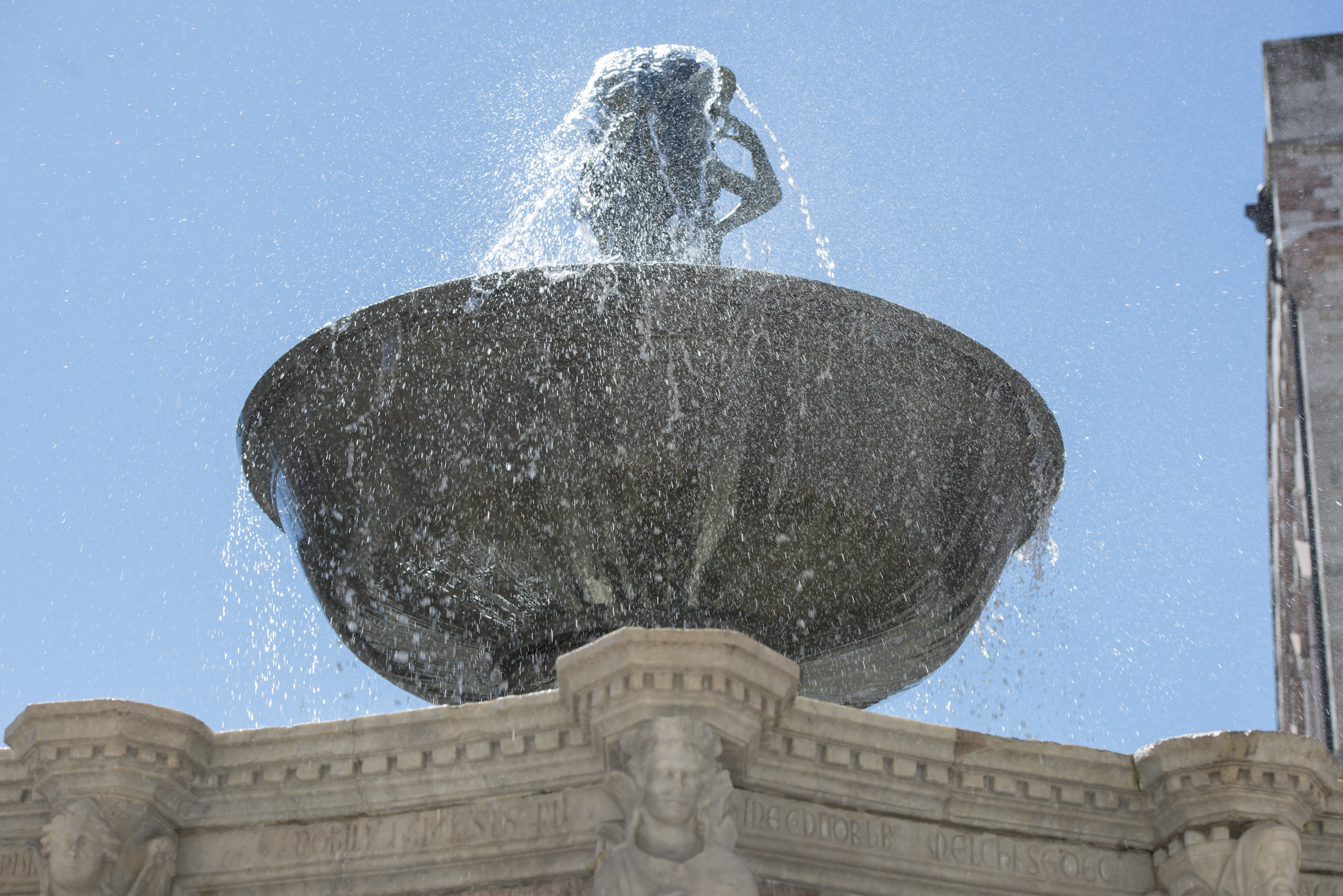 Fontana Maggiore This is a photo of a monument which is part of cultural heritage of Italy.